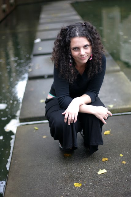 Irene McGee.